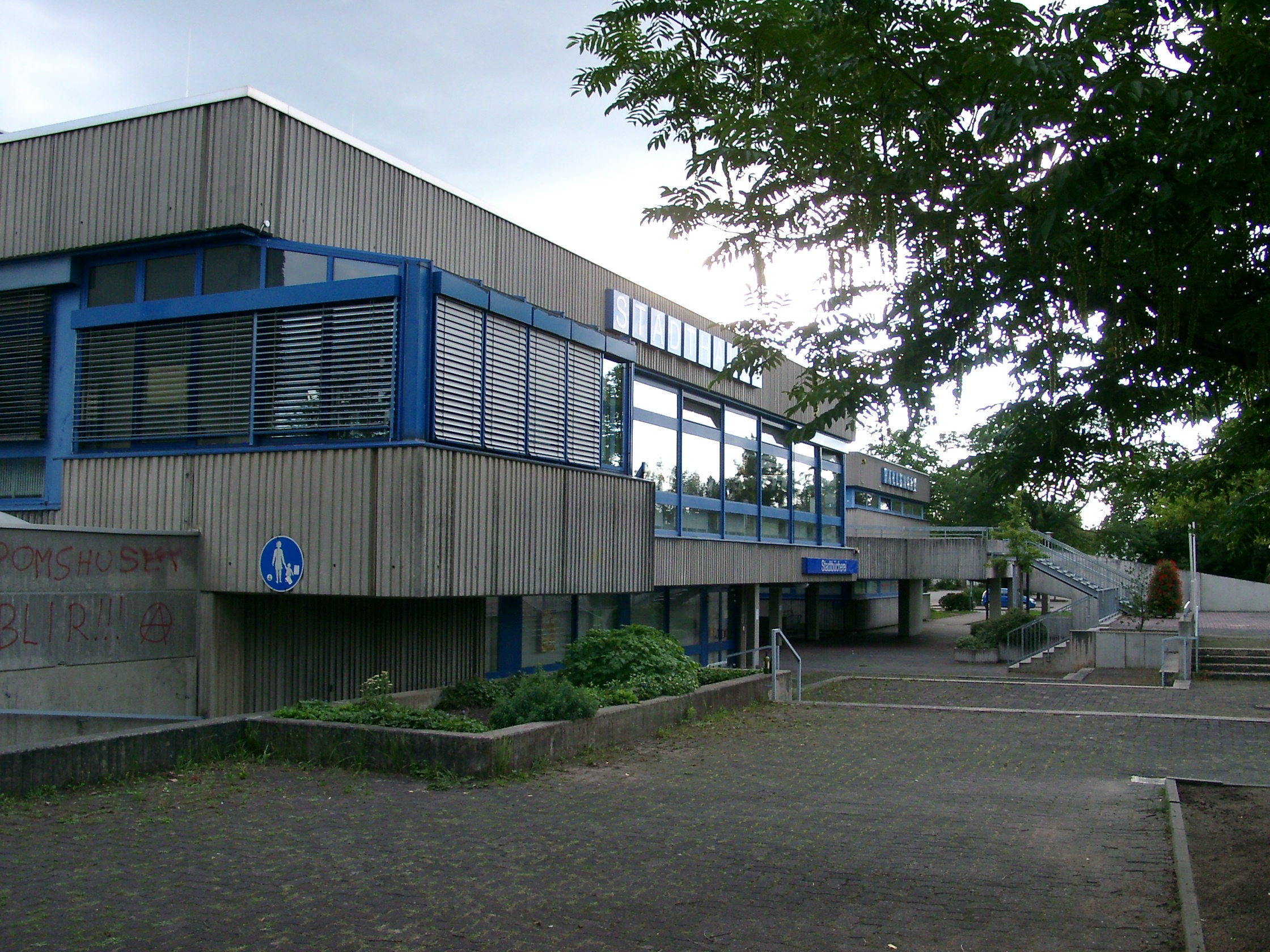 Langen, Hessen, Stadthalle mit Hallenbad